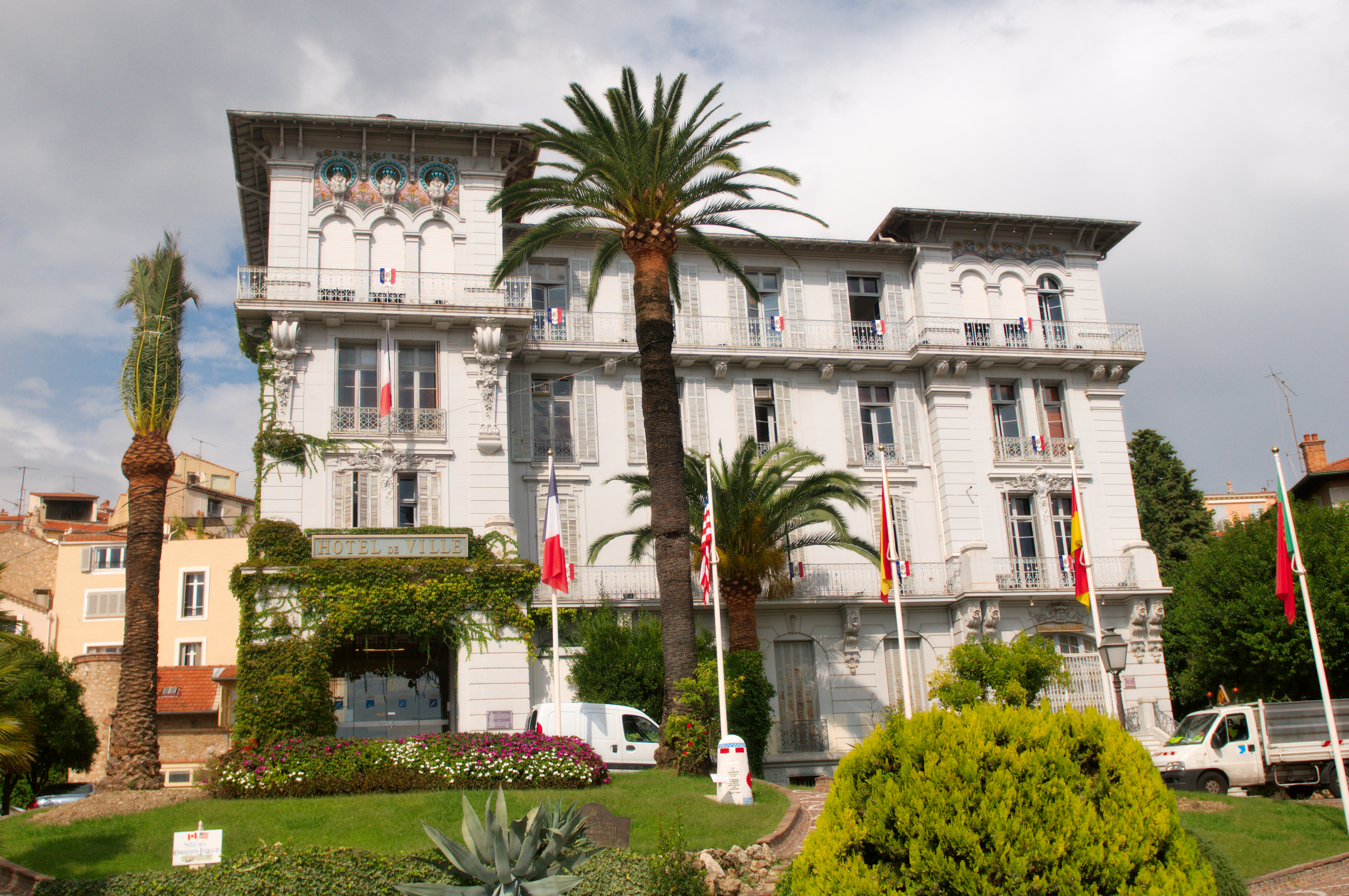 Le Cannet - Hôtel de ville